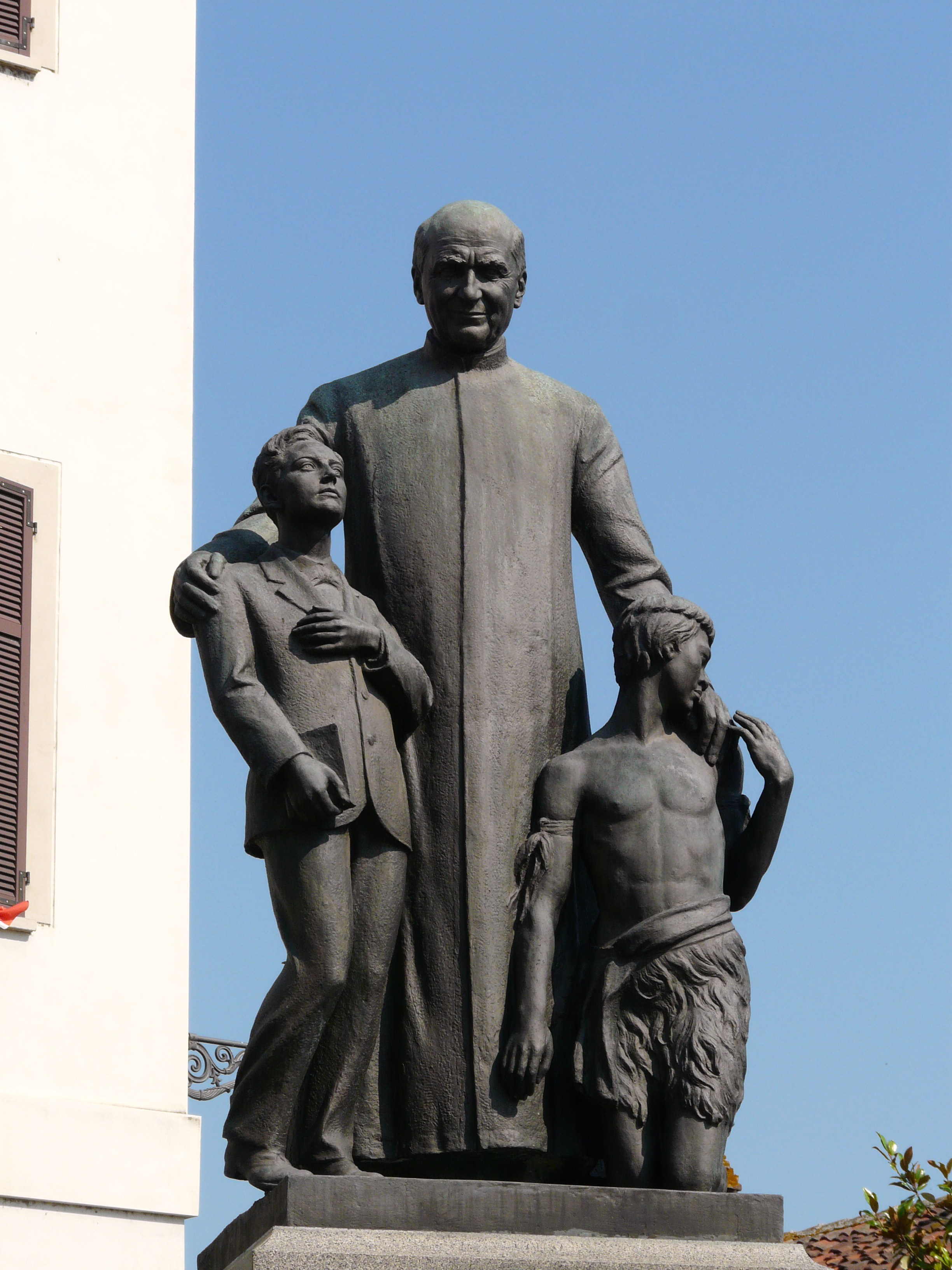 Monumento a don Pietro Ricaldone, Mirabello Monferrato, Piemonte, Italia